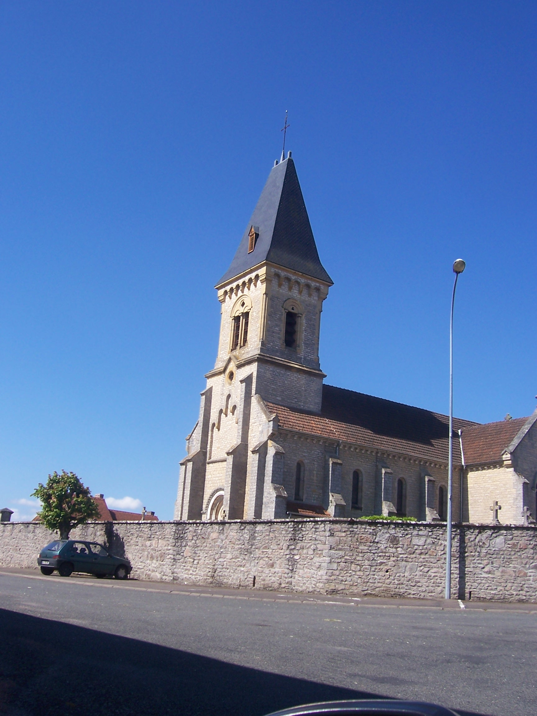 Eglise de Saint-Eusèbe